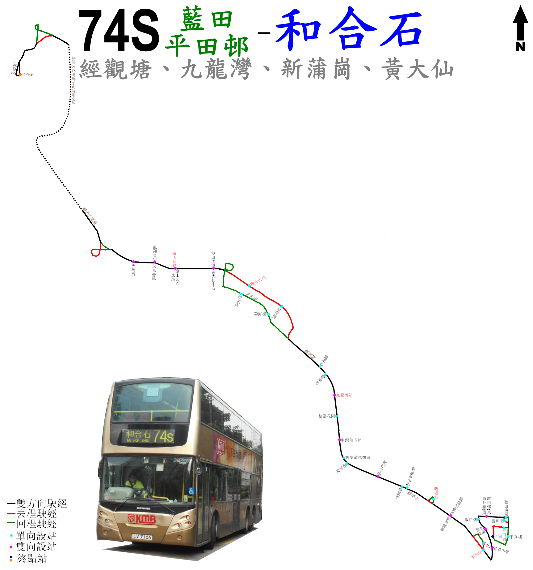 中文（香港）: 九巴74S線的走線圖